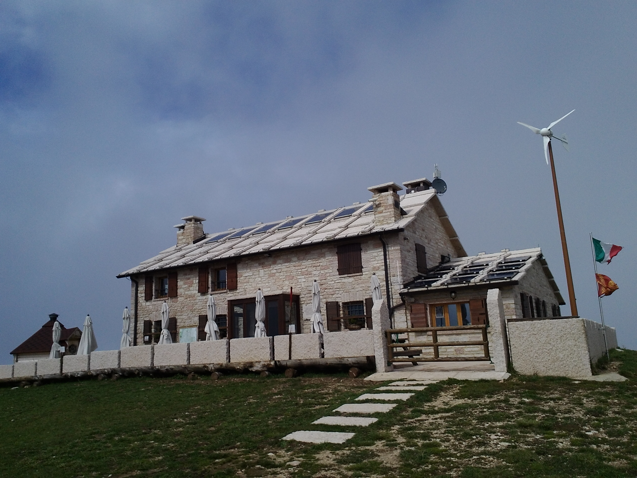 Rifugio Castelberto - Erbezzo - Verona